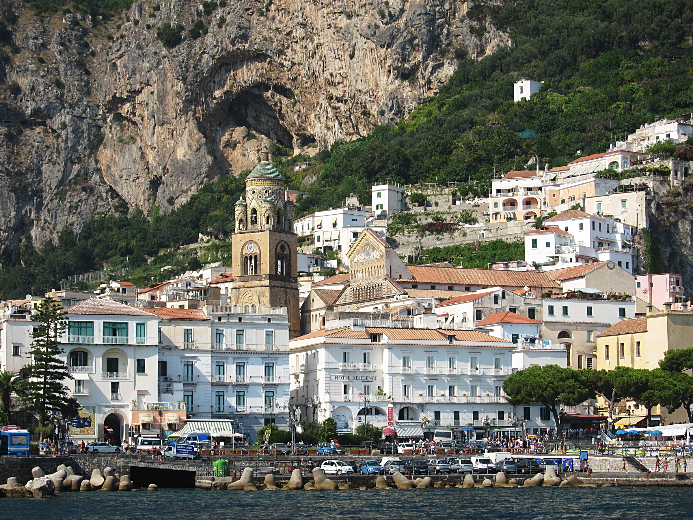 Vue d'Amalfi (Italie).